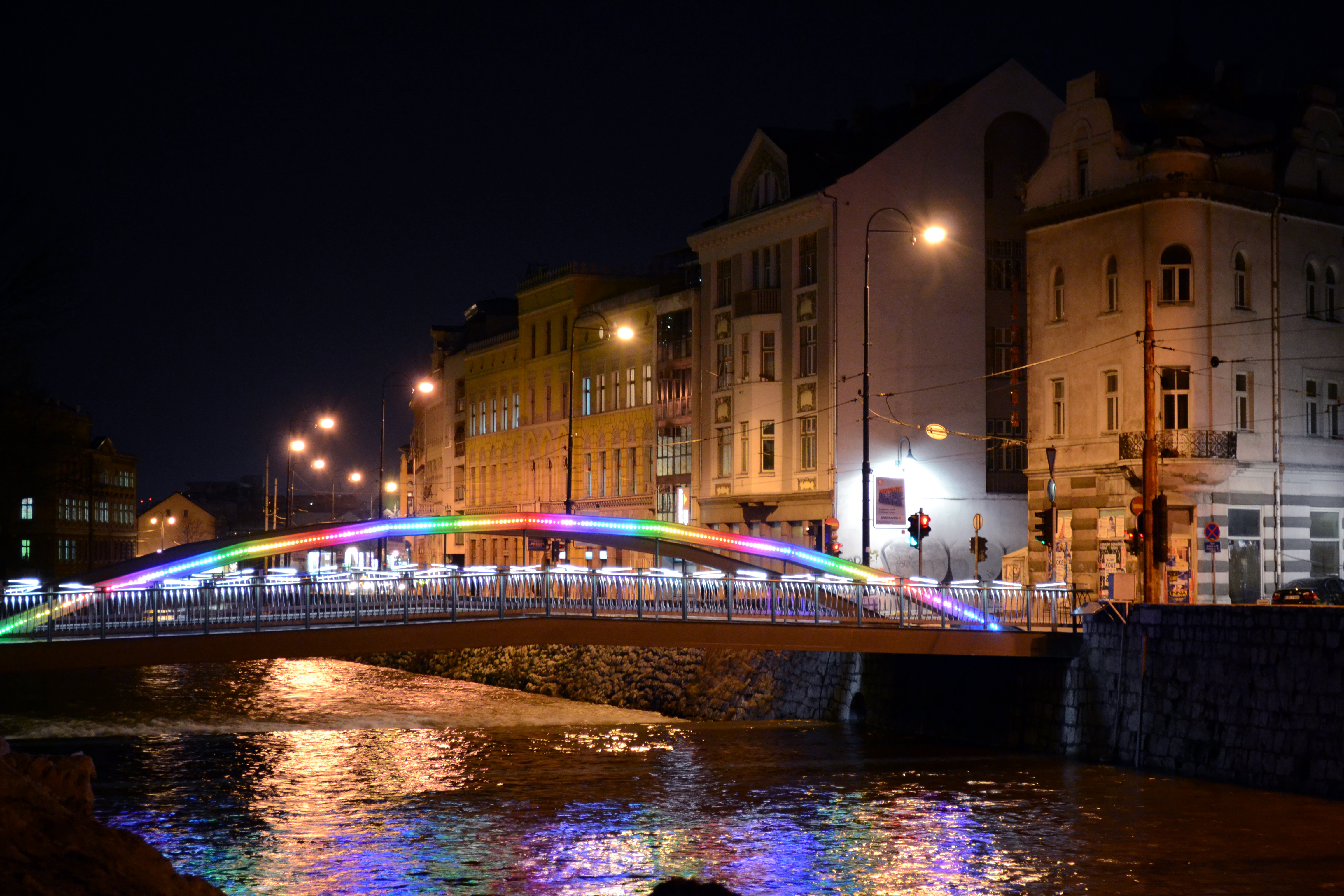 Ćumurija bridge, Sarajevo.